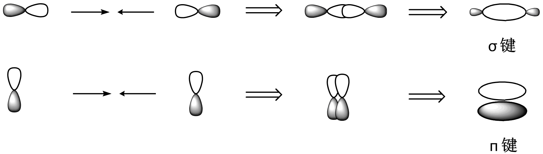 sigma键和pi键